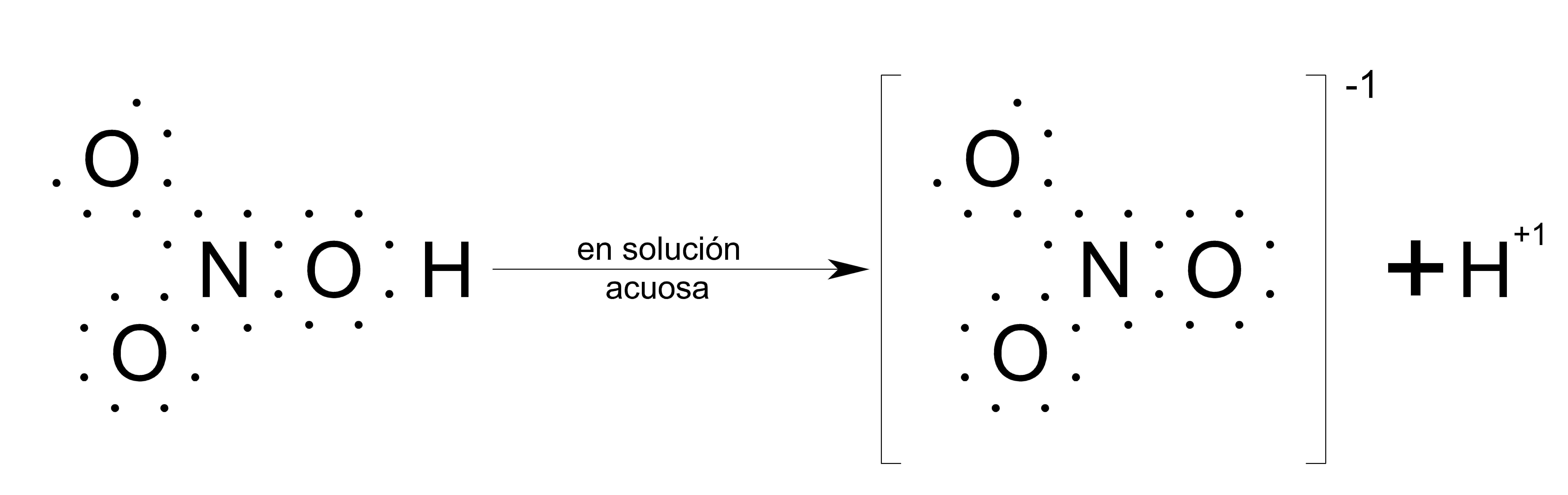 Estructura de Lewis que sobre el proceso de ionización reversible para el hidróxido, Ácido nítrico. Esta imagen esta mejor explicada en la sección 6 del articulo Nomenclatura química de los compuestos inorgánicos, en